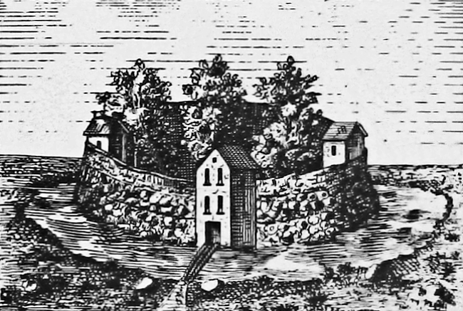 Burg Arnesvelde, eine Darstellung von 1897. Die Darstellung folgt einem der Randleistenbilder der sogenannten Rantzau-Tafel aus dem 16. Jahrhundert, die gegenwärtig auf Gut Krengerup auf Fünen aufbewahrt wird